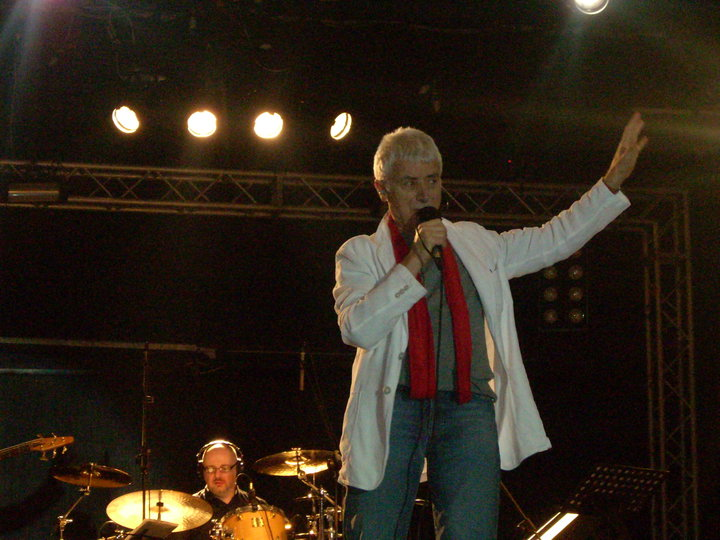 Il cantante italiano Don Backy nel 2010 in concerto al PalaPartenope di Fuorigrotta (Napoli)